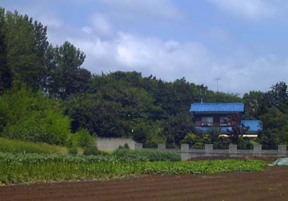 東京都府中市の浅間山を南側から撮影。